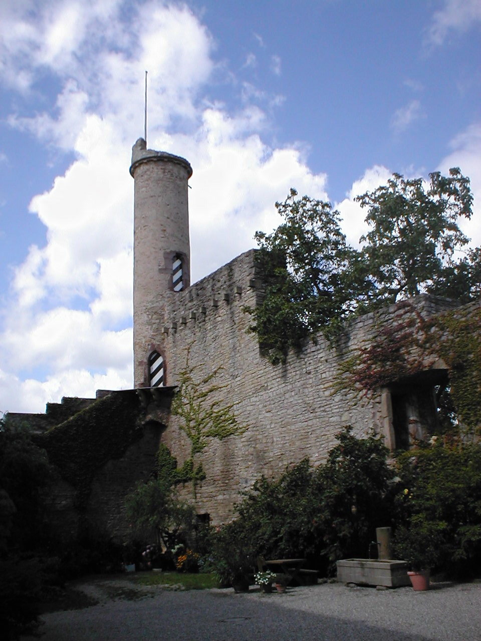 Der "Schneck", der Burgturm des Oberen Schlosses in Talheim